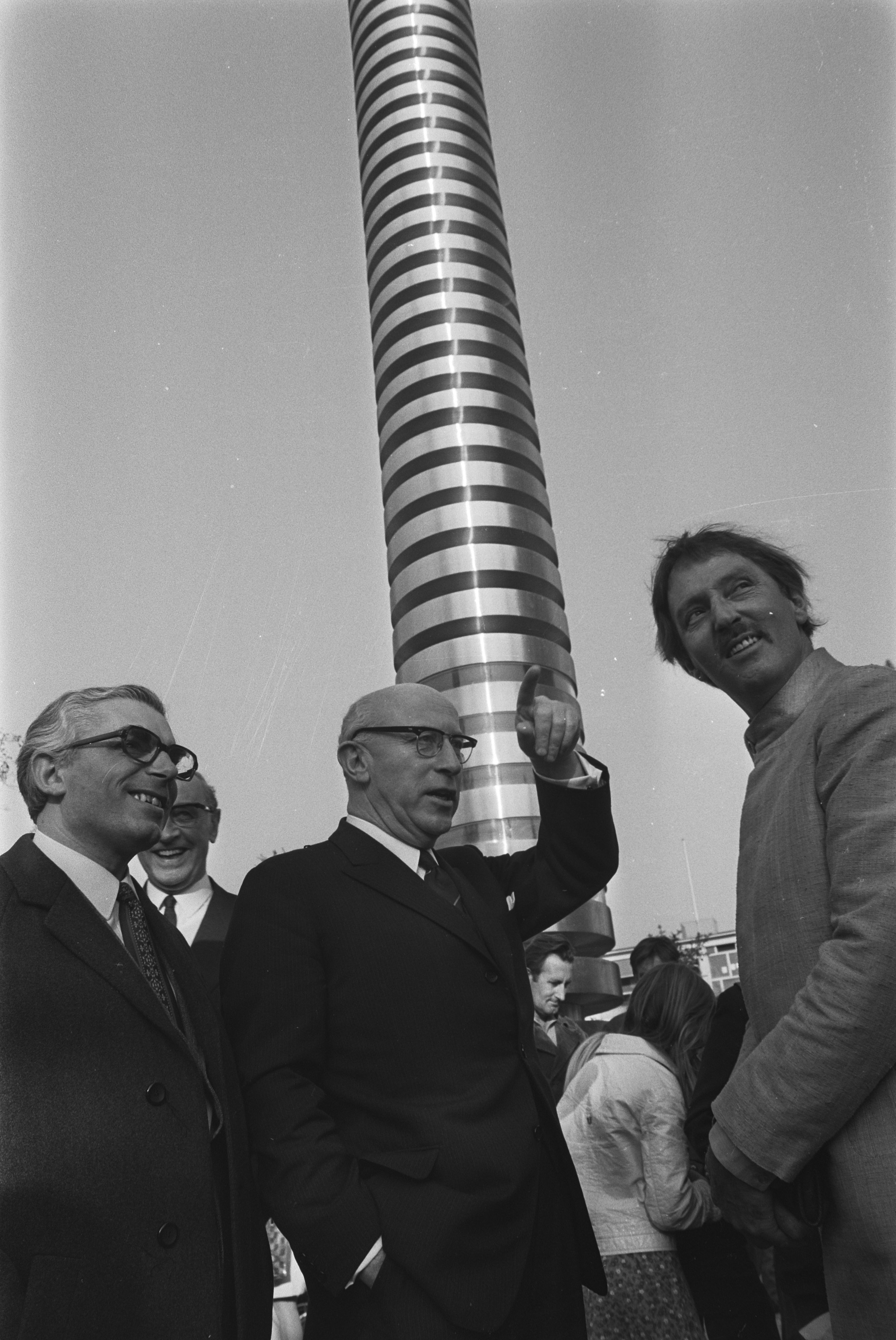 Collectie / Archief : Fotocollectie Anefo Reportage / Serie : [ onbekend ] Beschrijving : Burgemeester Samkalden en wethouder Polak nemen Winkler Prins Monument op Frederiksplein in ontvangst, Amsterdam; v.l.n.r. voor monument wethouder Polak Datum : 9 oktober 1970 Locatie : Amsterdam, Noord-Holland Trefwoorden : Ontvangsten, burgemeesters, monumenten, wethouders Persoonsnaam : Polak, Wim, Volten, André Instellingsnaam : Winkler Prins Monument Fotograaf : Mieremet, Rob / Anefo, [onbekend] Auteursrechthebbende : Nationaal Archief Materiaalsoort : Negatief (zwart/wit) Nummer archiefinventaris : bekijk toegang 2.24.01.05 Bestanddeelnummer : 923-9119